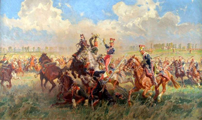 Les lanciers polonais de la Garde à la bataille de Reichenbach, le 22 mai 1813. Les quatre escadrons du régiment présents, commandés par Chlapowski et Jerzmanowski, y mènent plusieurs charges victorieuses contre la cavalerie russe, livrant de nombreux prisonniers.